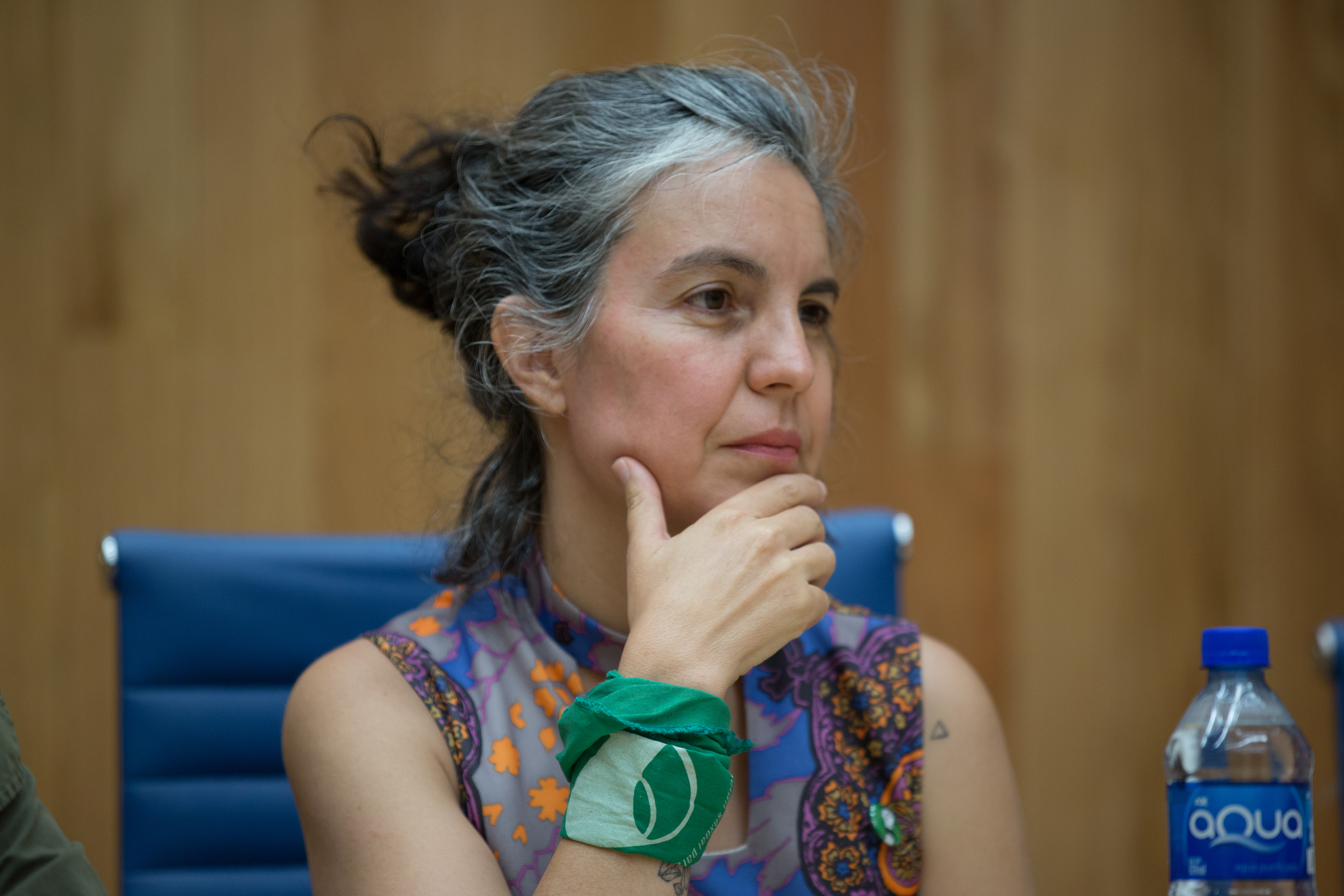 Festival Ambulante. Mónica Nepote en la función de "12th & Delaware" en la Sala Pablo González Casanova en la Facultad de Ciencias Políticas y Sociales, UNAM.